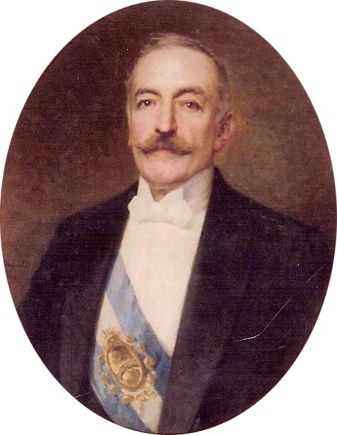 Retrato del presidente argentino Roque Sáenz Peña (1851-1914) en el Museo Parlamentario